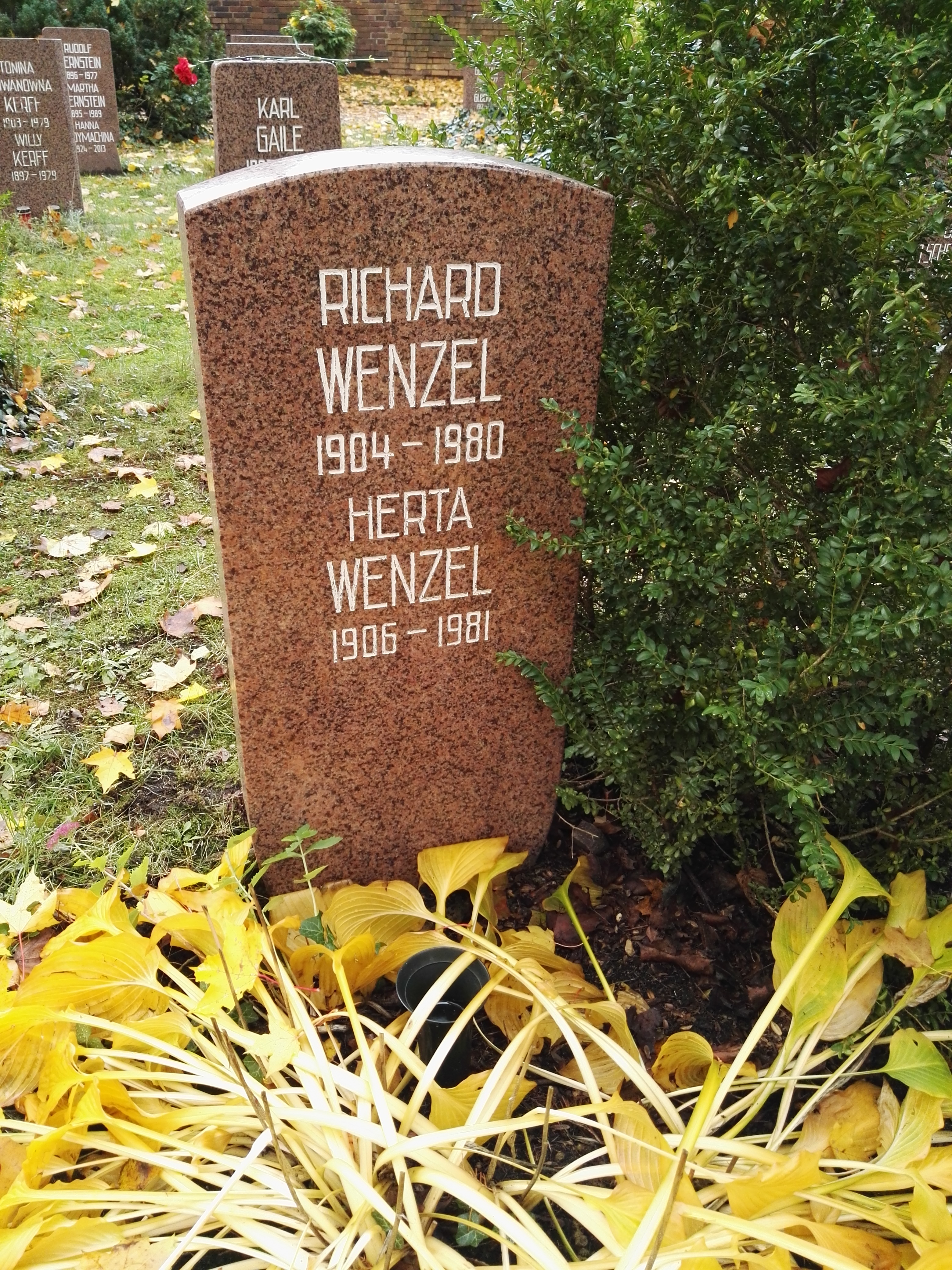 Grab von Richard Wenzel und Herta Wenzel auf dem Sozialistenfriedhof des Zentralfriedhofs Friedrichsfelde